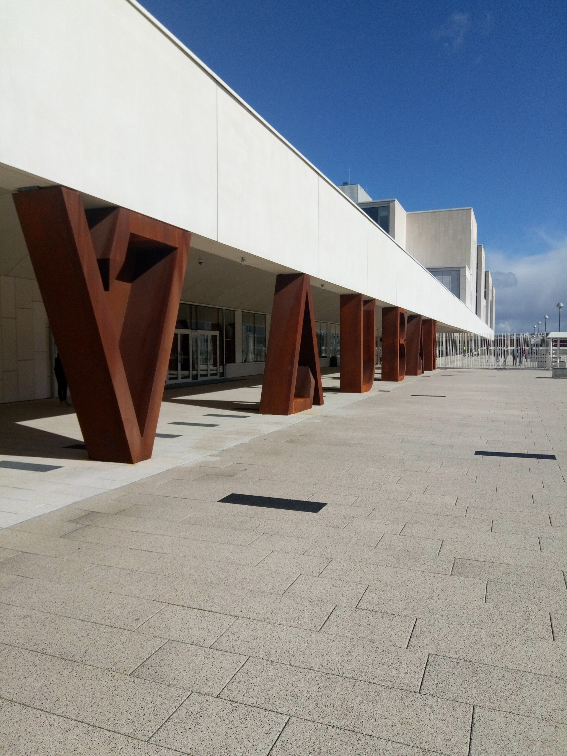 Liceo Vauban en Gasperiŝo, Luksemburgo